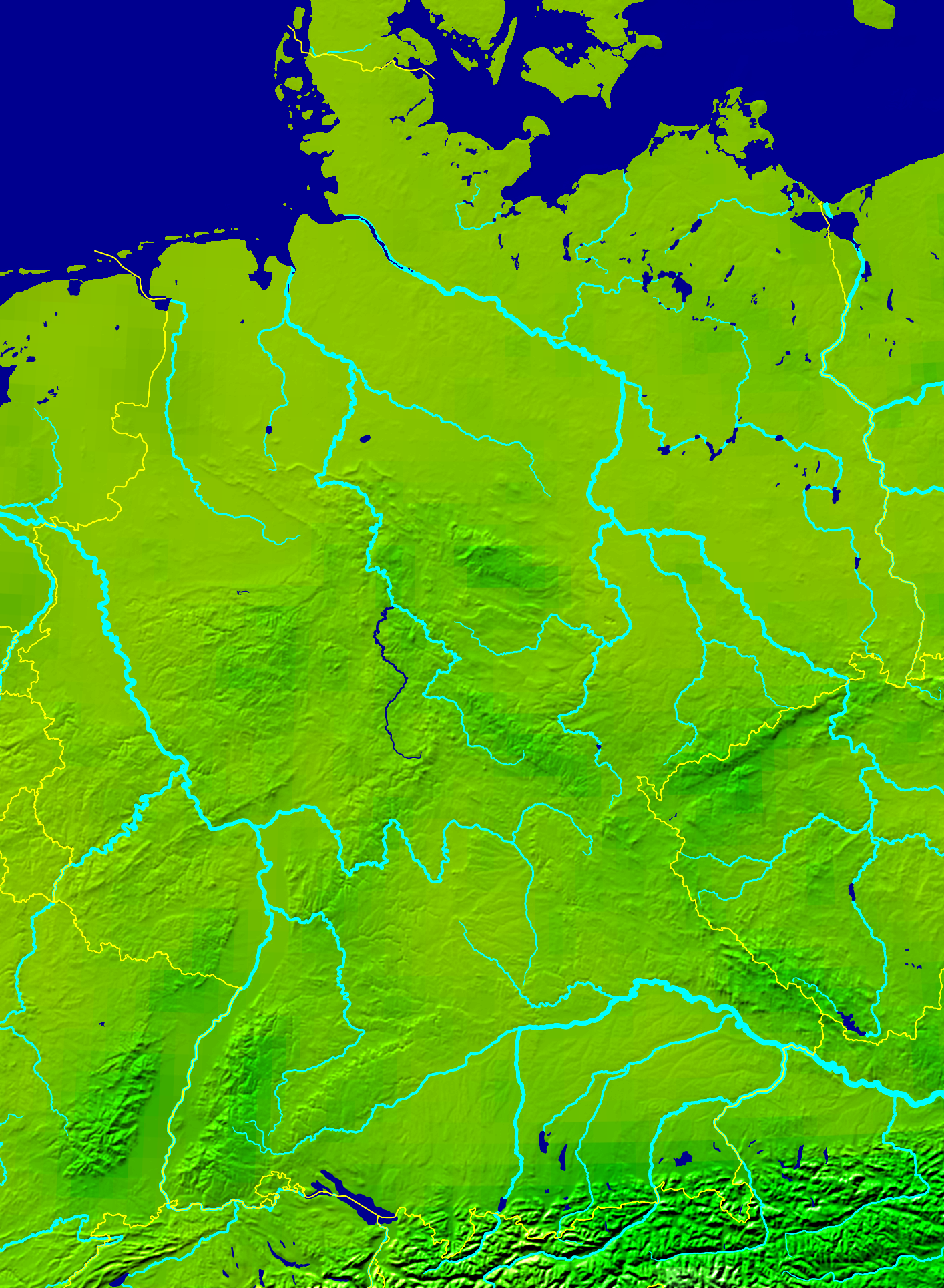 Zu sehen ist die Lage der Fulda in Deutschland